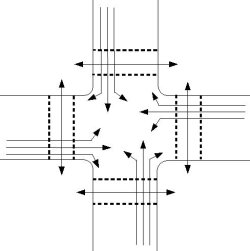 Schéma de description des 16 mouvements possibles à un carrefour Schéma créé avec , retouchée avec Gimp par Luk sous licence GFDL Luk